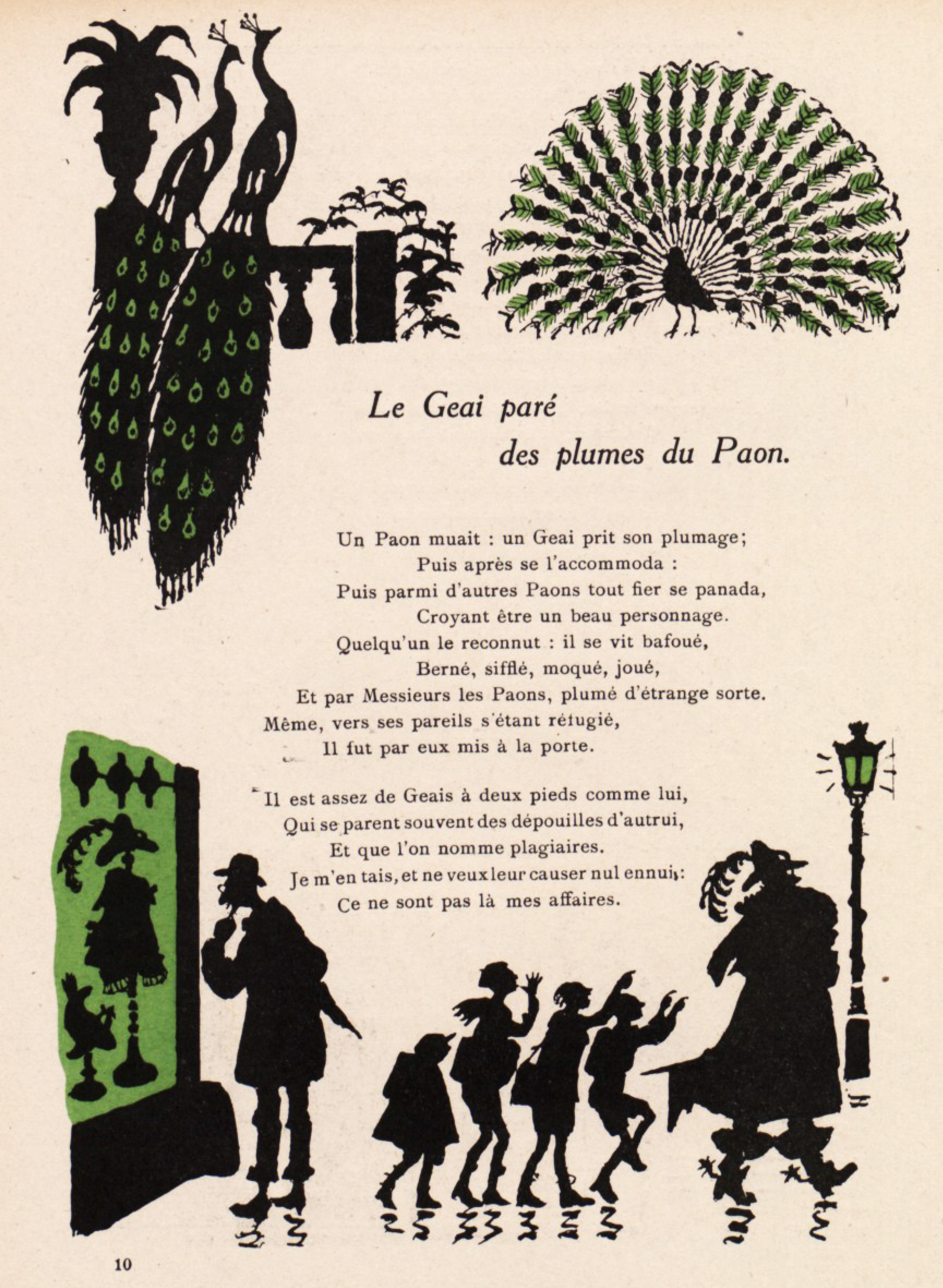 Dessin réalisé par Henri Avelot représentant la fable Le Geai paré des plumes du Paon de Jean de La Fontaine et extrait du livre " Dix fables d'animaux, illustrations en silhouettes humoristiques aux dépens des humains " (Paris, édition Henri Laurens, 1932).